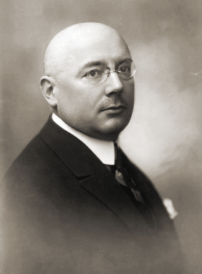 Franciszek Charwat